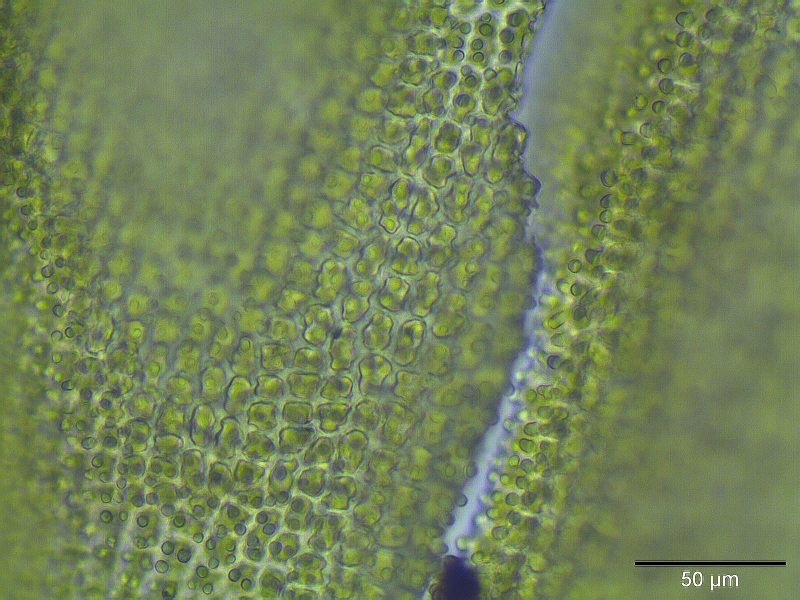 Verlängerte Zackenmütze (Racomitrium elongatum), Laminazellen, Vergrößerung: 400x